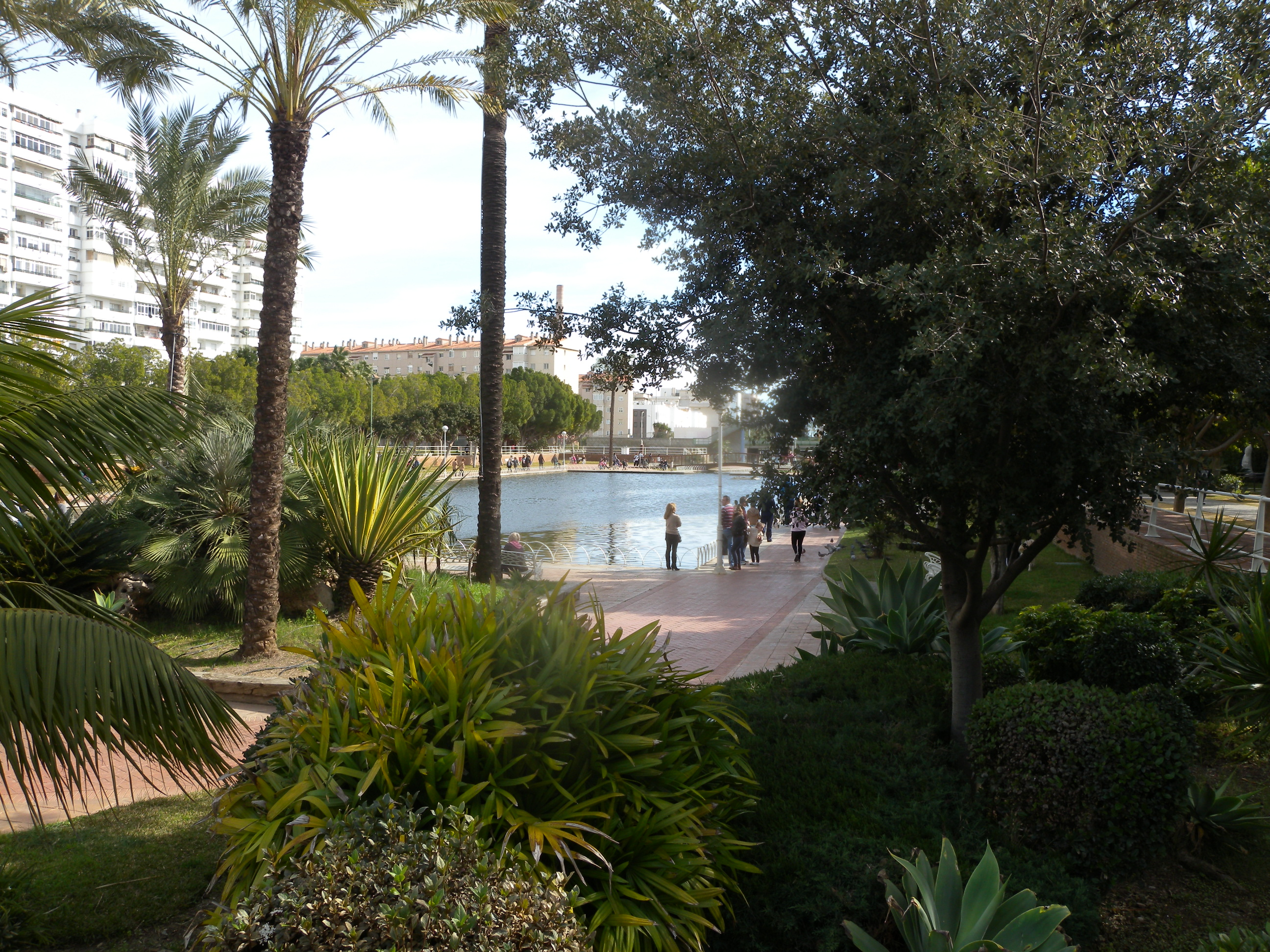 Parque del Oeste, Málaga, España